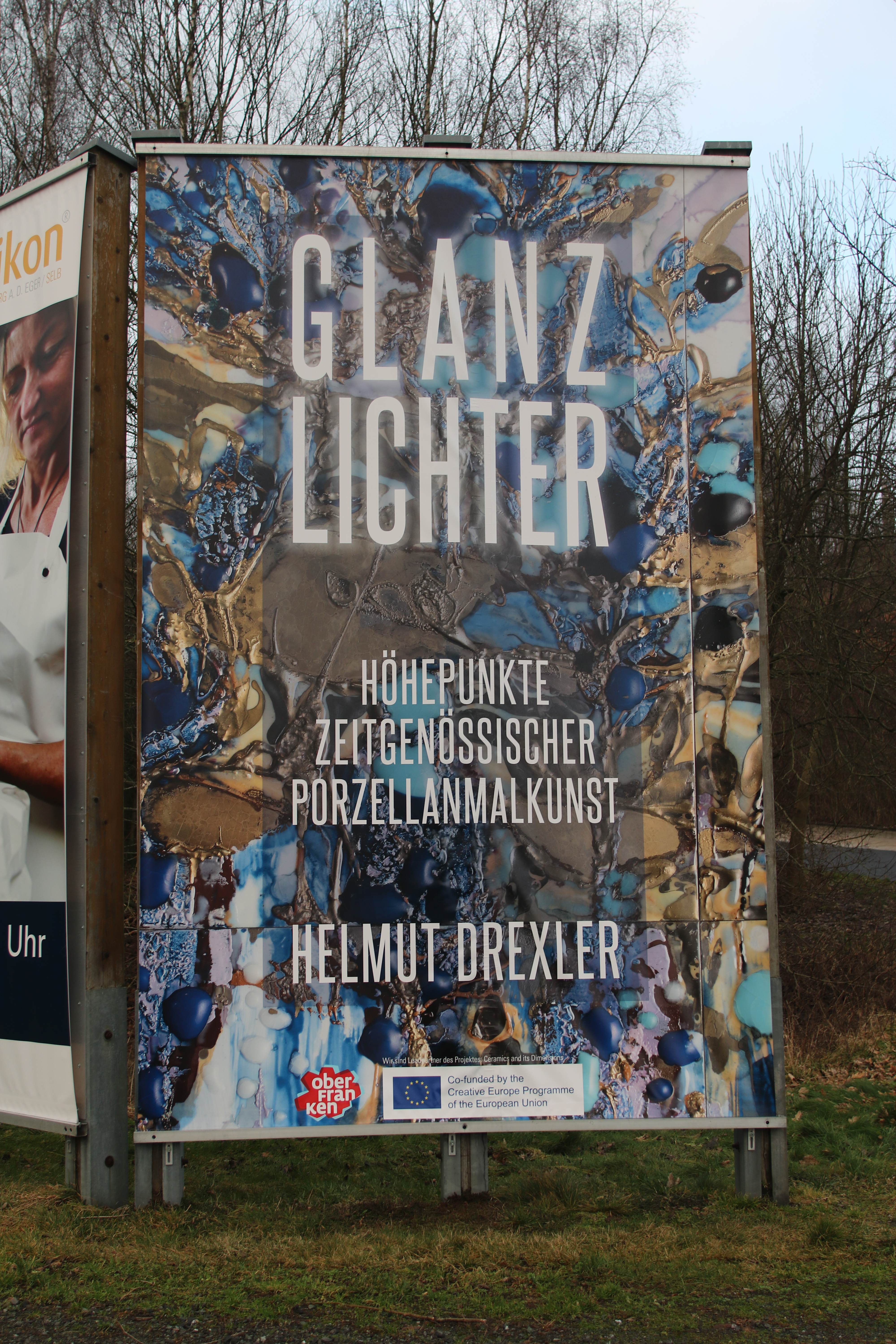 Daueraustellung mit Objekten von Helmut Drexler